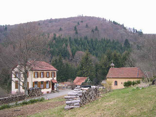 Lamadeleine-Val-des-Anges (Territoire de Belfort, France) mairie et chapelle + paysage vosgien Photo prise par LP90 le 26 mars 2004 Copyright : licence GFDL LP90